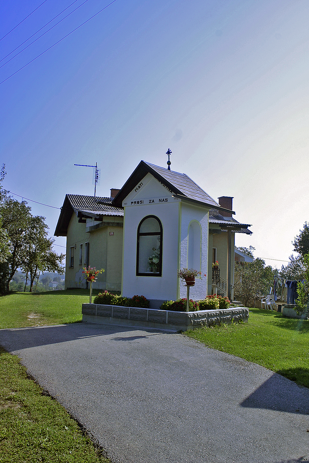 Kapela žalostne Matere Božje, Gornji Črnci. Mother of God Chapel, Gornji Črnci. Kapelle zur schmerzhafte Mutter Gottes, Gornji Črnci.